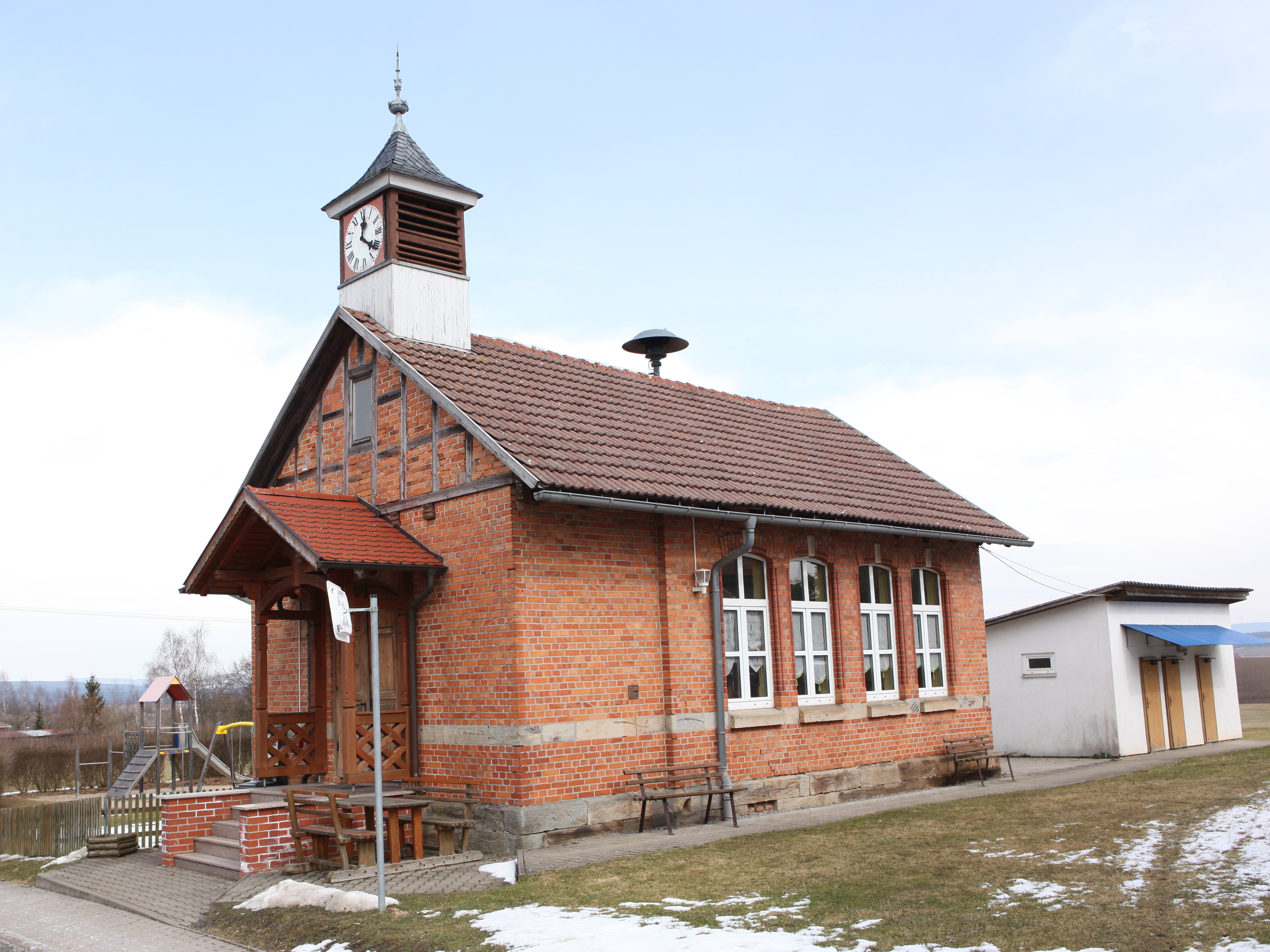 Ehemalige Schule in Hetschbach, OT von Veilsdorf, Landkreis Hildburghausen